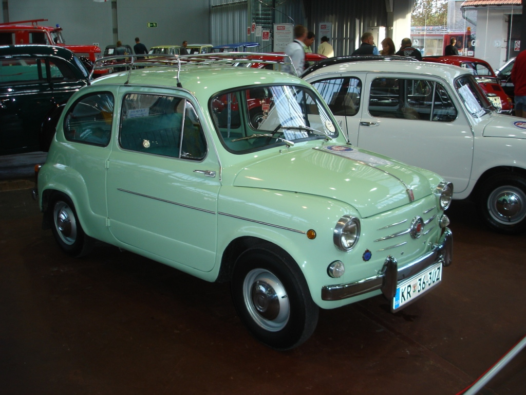 Zastava 750 (Fičo) on the 1. Oldtimer festival Codelli in Ljubljana, Slovenia